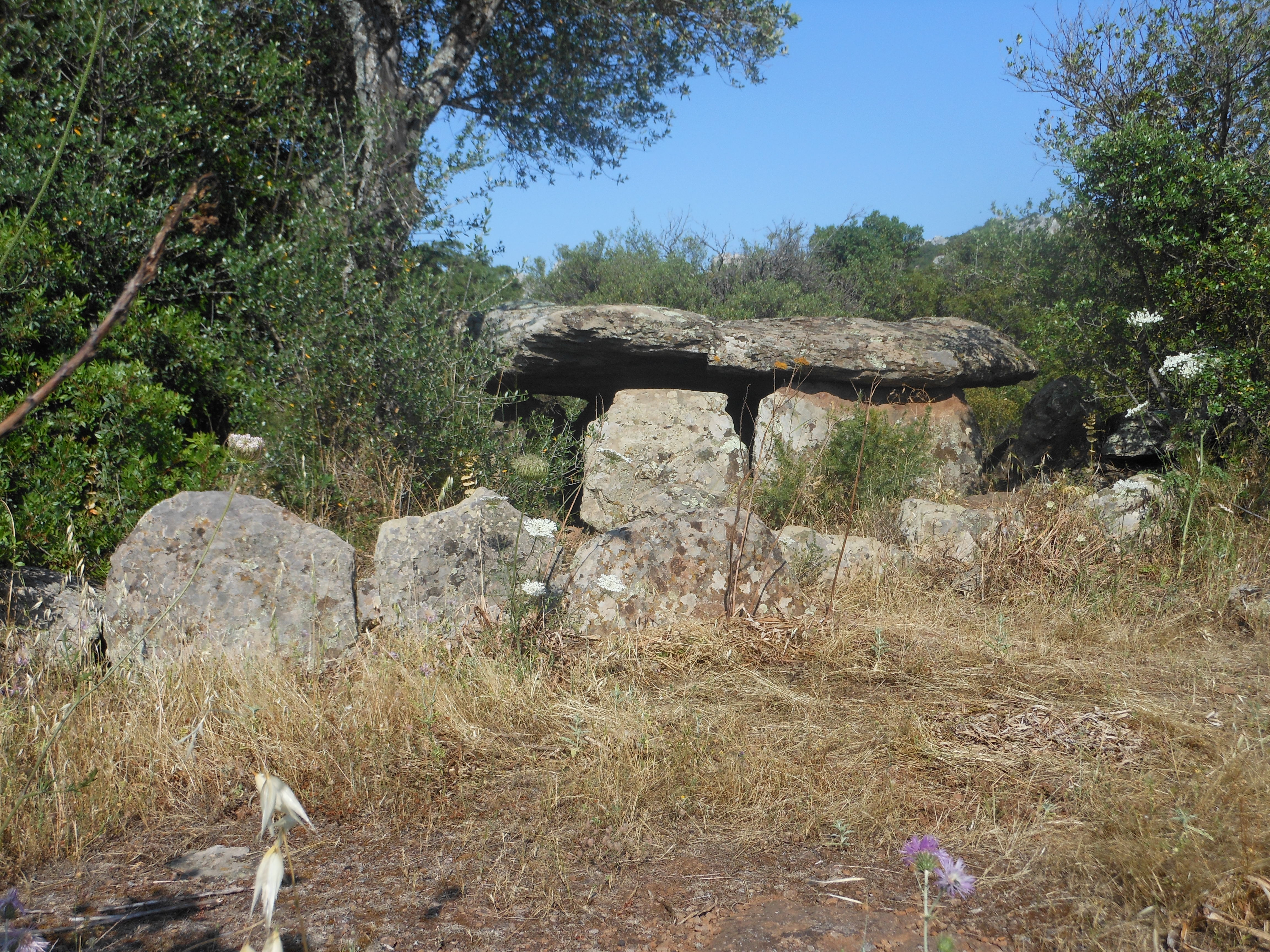 Dorgali - Dolmen di Motorra